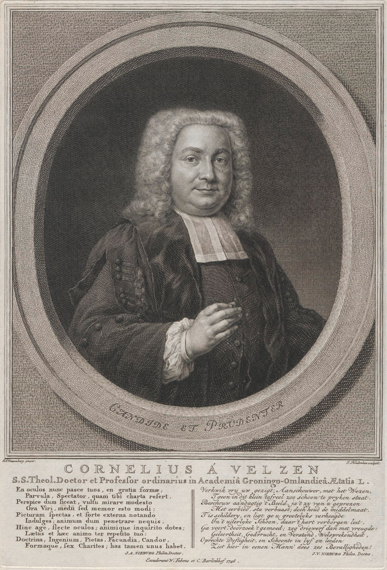 Kopergravure van Cornelius van Velzen door Jacobus Houbraken.